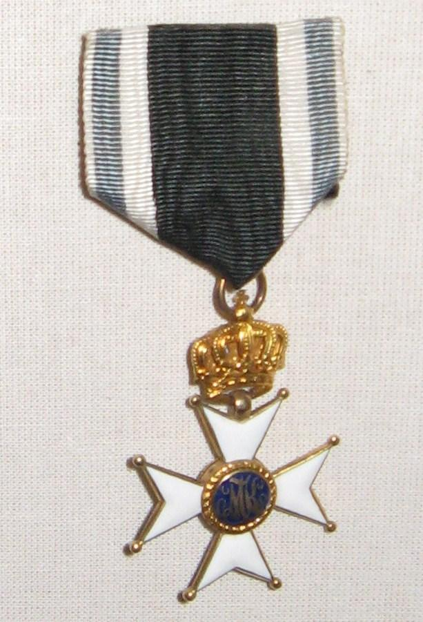 Militär-Max-Joseph-Orden: Ritterkreuz